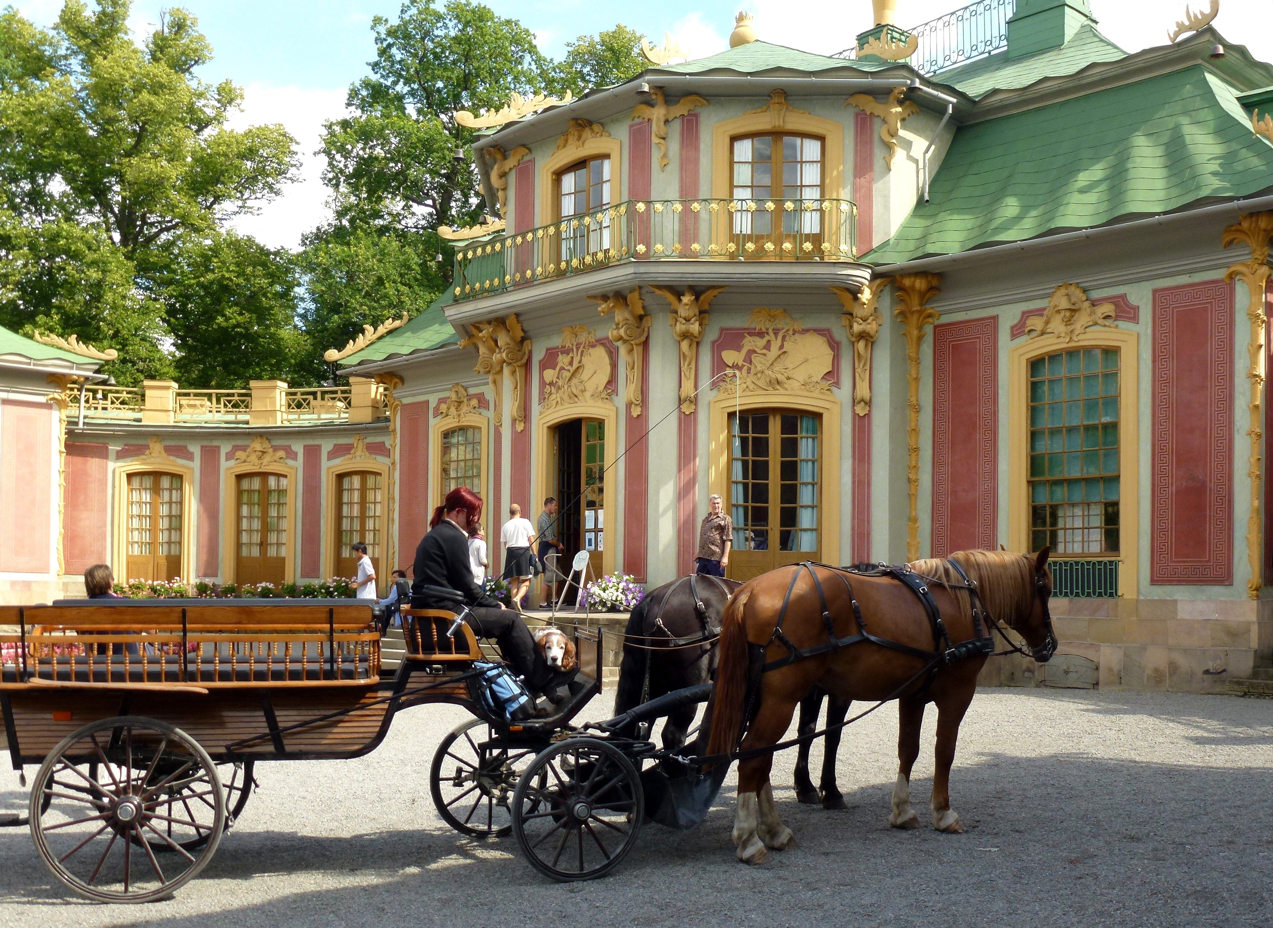 Kina slott, fasad mot norr